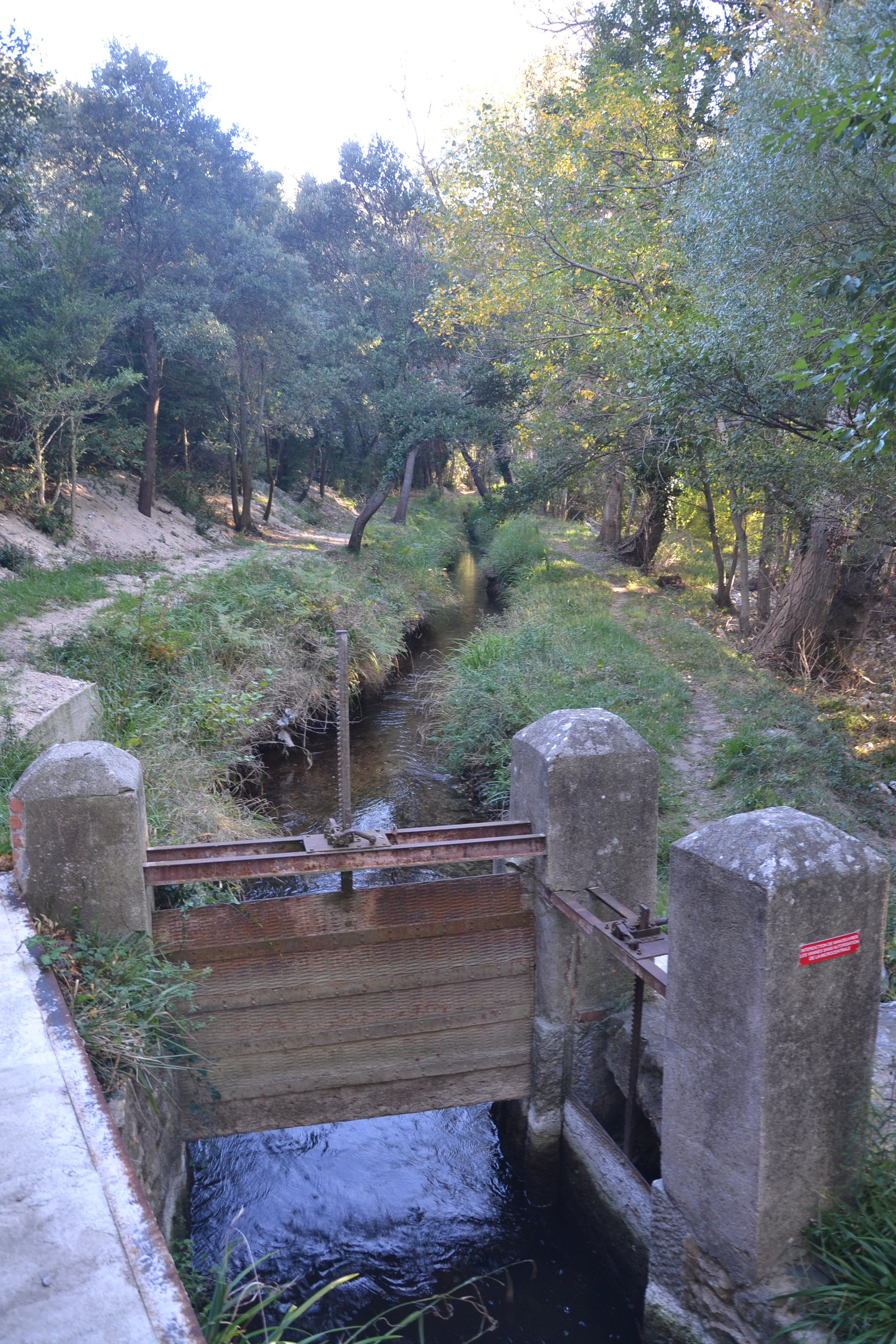 Canal d'irrigation longeant l'Agly à Saint-Arnac (Pyrénées-Orientales, France).